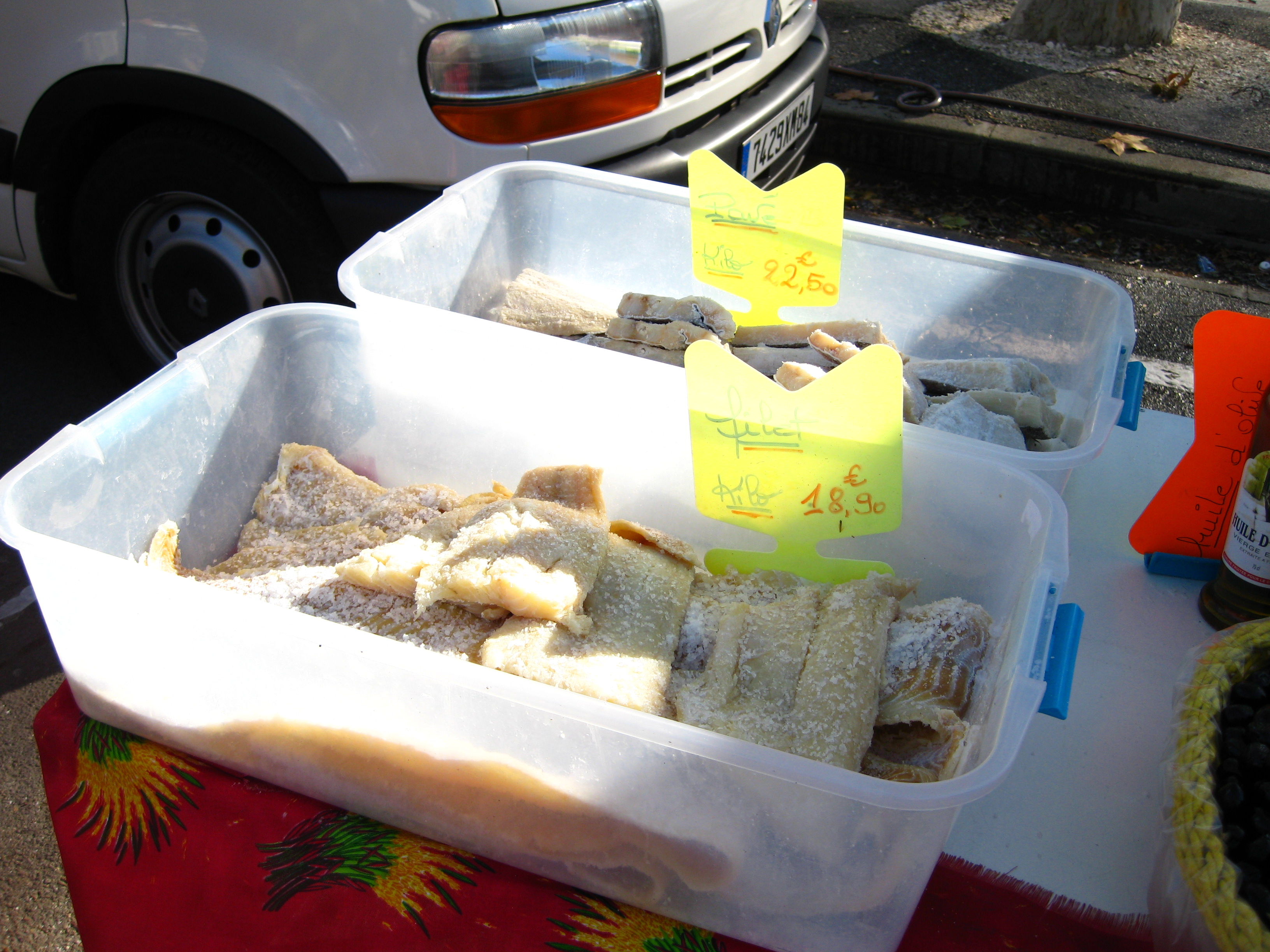 Étal de morue salée à Villeneuve-lès-Avignon